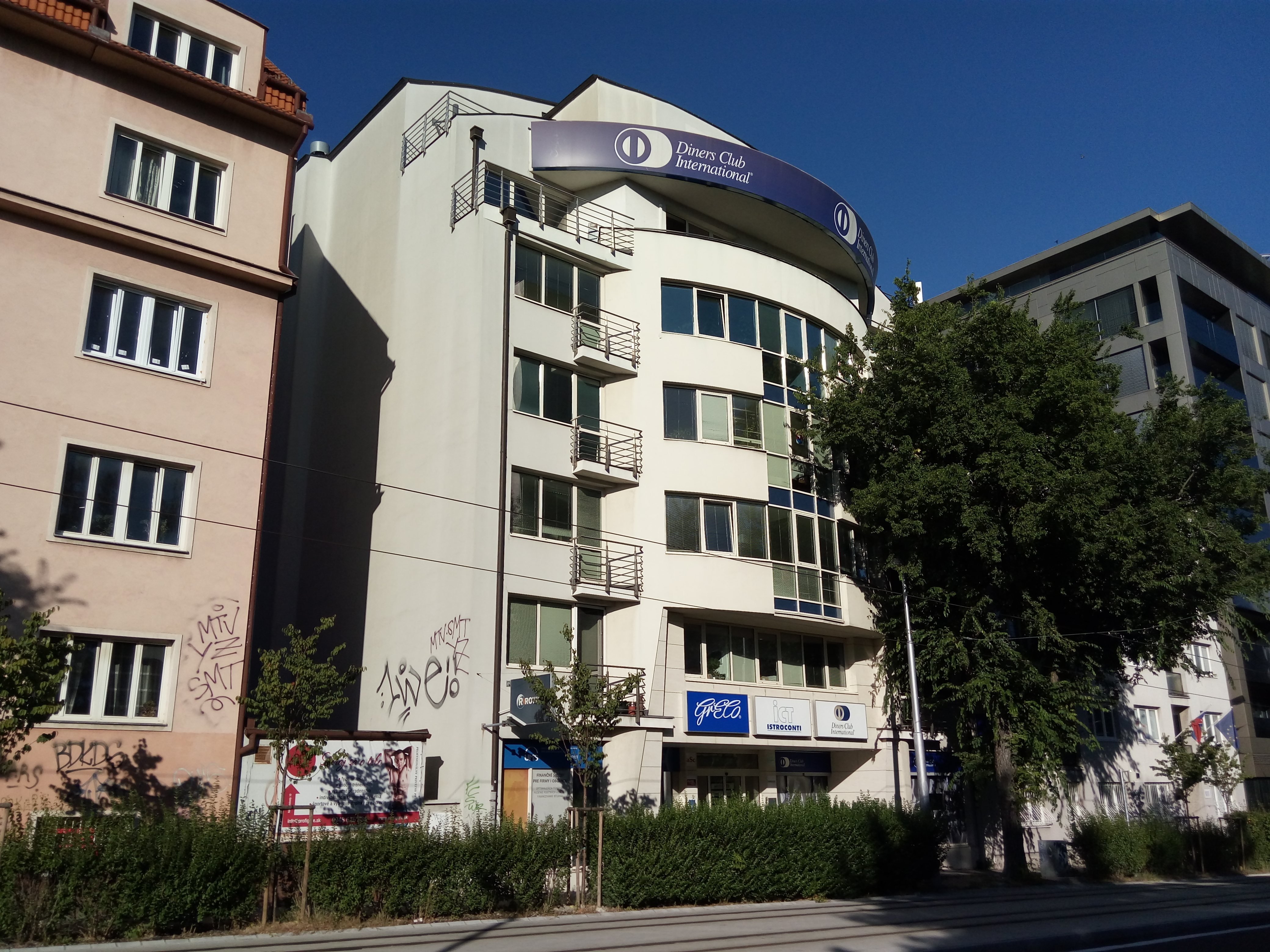 Námestie slobody 11, Staré Mesto, Bratislava